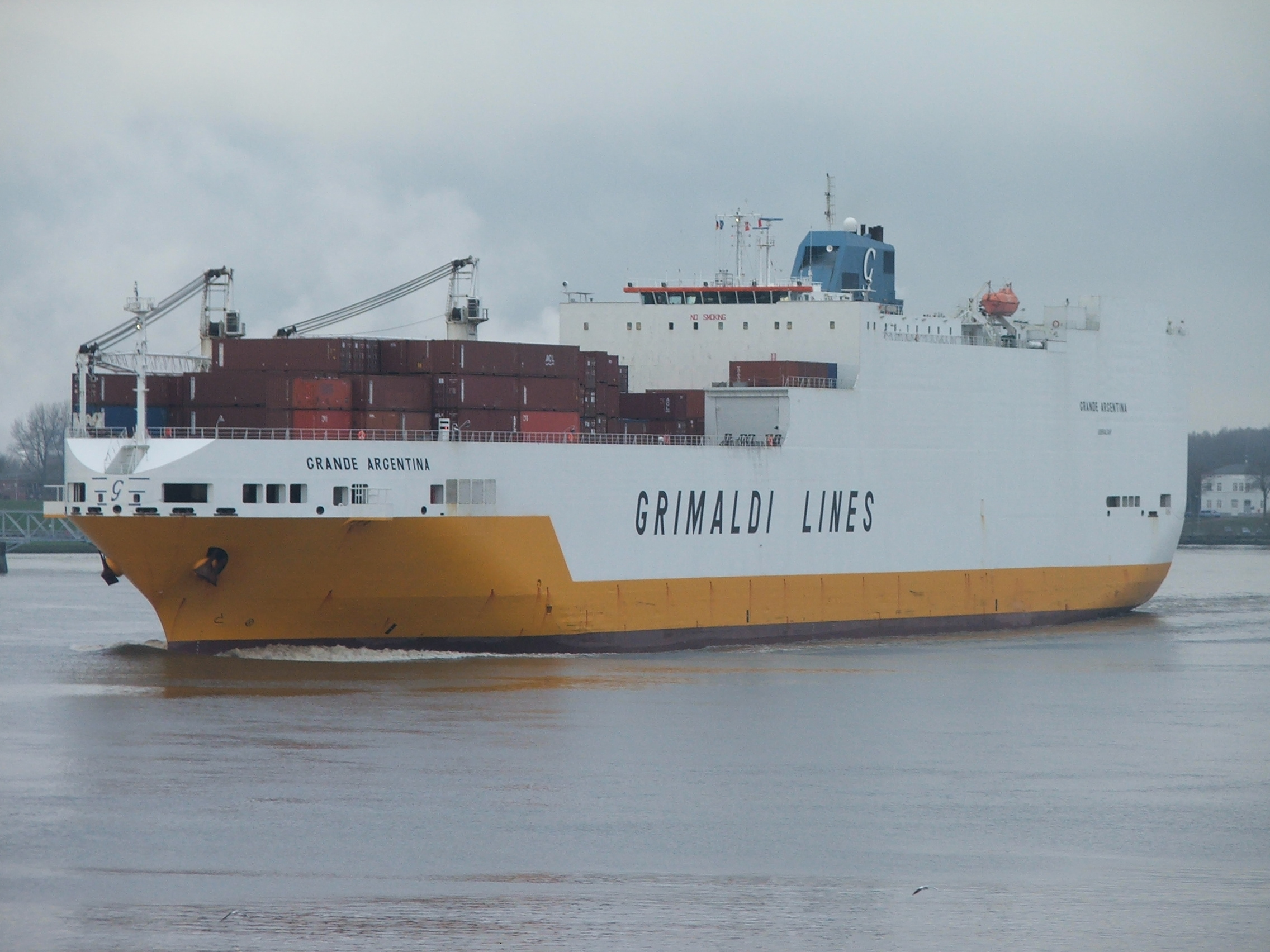 ConRo-Frachter Grande Argentina der italienischen Reederei Grimaldi, die Elbe einkommend im Dezember 2009 IMO Number: 9198135 MMSI Number: 236541000 Callsign: ZDJO2 Length: 214 m Beam: 32 m